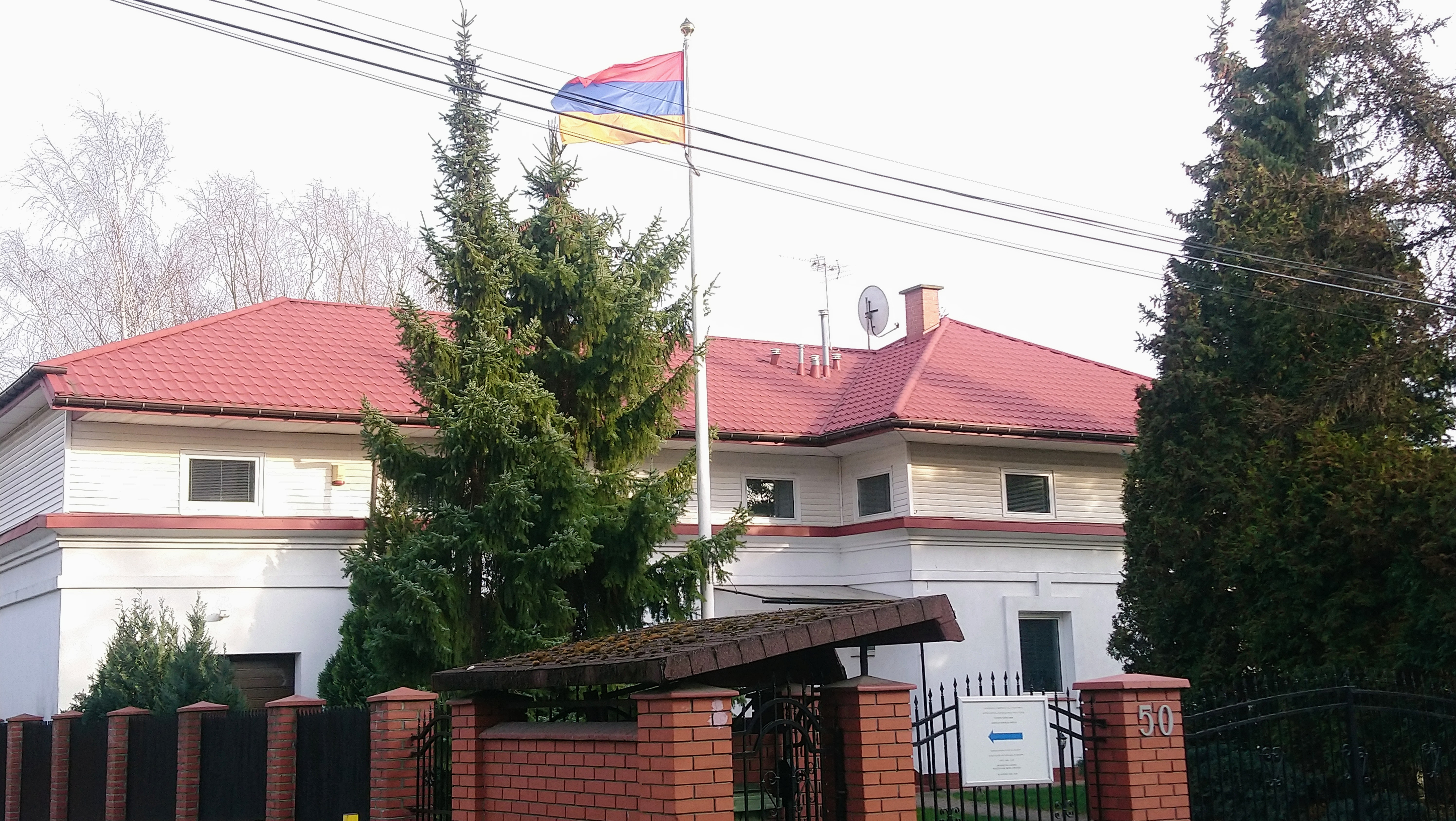 Ambasada Armenii w Warszawie